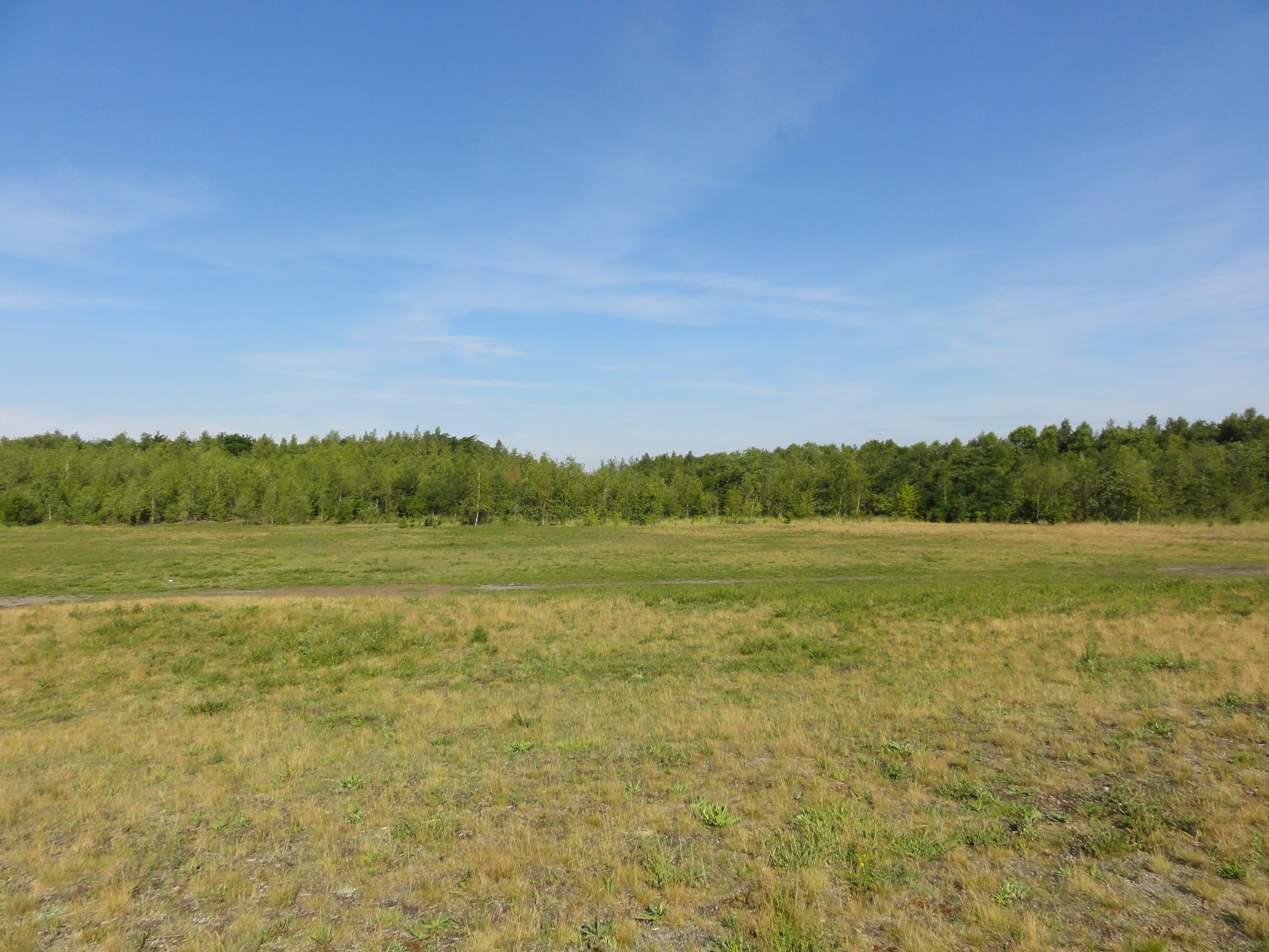 Terril n° 149 dit Saint Mark Sud, considéré disparu, Fosse Saint Mark de la Compagnie des mines d'Anzin, Escaudain, Nord, Nord-Pas-de-Calais, France.